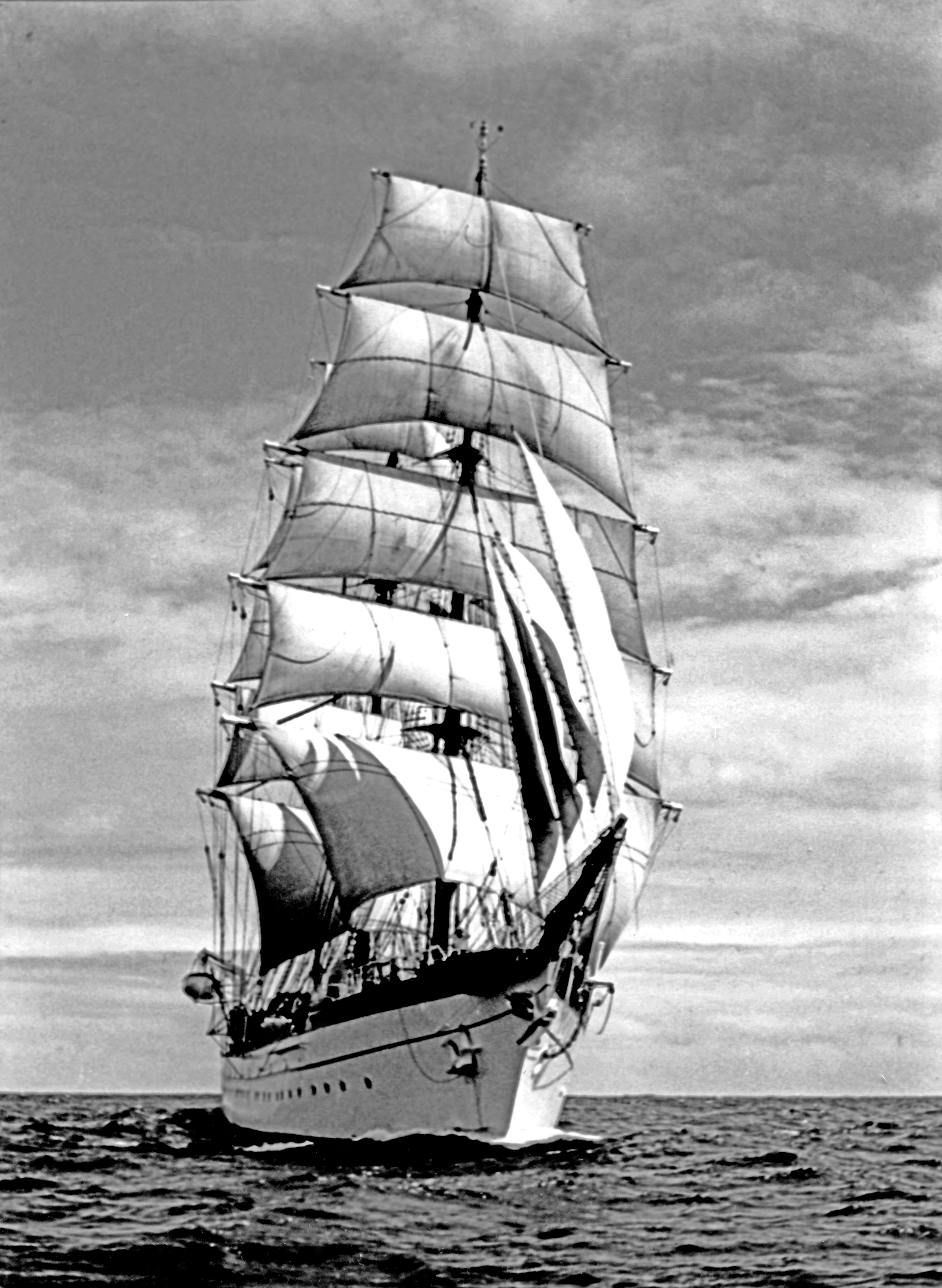 Format: Fotopositiv Dato / Date: ca. 1967 Fotograf / Photographer: Ukjent Sted / Place: Ukjent - til sjøs Oppdatert / Update: 03.09.2015 [lagt til AIS tracking] Wikipedia: «Gorch Fock» (1958) Marinetraffic: AIS tracking Eier / Owner Institution: Trondheim byarkiv, The Municipal Archives of Trondheim Arkivreferanse / Archive reference: Tor.H49.B03.F28727 Merknad: Bilde overrakt Trondheims ordfører i anledning skipets besøk 12 - 15 juni 1967. Adresseavisen mandag 12 juni 1967 s. 14: Seilskoleskip fra den tyske marine på besøk i Trondheim i 4 dager Skipet er åpent for besøk tirsdag og onsdag - barneselskap ombord tirsdag Det tyske seilskoleskipet "Gorch Fock" kom til Trondheim sent lørdag kveld og ankret opp på reden. Skipet, som er et trenings-fartøy for offiserer og underoffiserer i den tyske marine, blir i Trondheim til torsdag morgen - og vil i løpet av formiddagen i dag legge til kai ved Brattøra. "Gorch Fock" er det annet skip ved dette navn, og det femte i sin klasse. Skipet er en bark med et deplacement på 1 870 tonn. Tilsammen kan en sette 23 seil med 1 953 kvadratmeter seilflate. Kommandant ombord er kommandørkaptein Peter Lohmeyer, og med skipet er det 12 offiserer, 38 underoffiserer, 170 kadetter og 24 manns stambesetning - foruten 6 sivilister s.s. skipslege og meteorolog. I løpet av de dagene skipet blir i Trondheim, er det meningen bl.a. å gi adgang for publikum ombord. Etter det foreløbige program som foreligger vil skipet bli åpent for publikum tirsdag kl. 17.00 - 19.00, og onsdag 14.00 - 17.00. Tirsdag vil det også bli arrangert et barneselskap for barn fra et av byens barnehjem. Det vil også bli arrangert en fotballkamp mellom et lag fra skibets kadetter og et lag fra Trondheim. I formiddag skal skipets kommandant og tre av offiserene på offisiell visitt til Trondheims ordfører, Politimesteren i Trondheim, Havnefogden og de militære myndigheter.